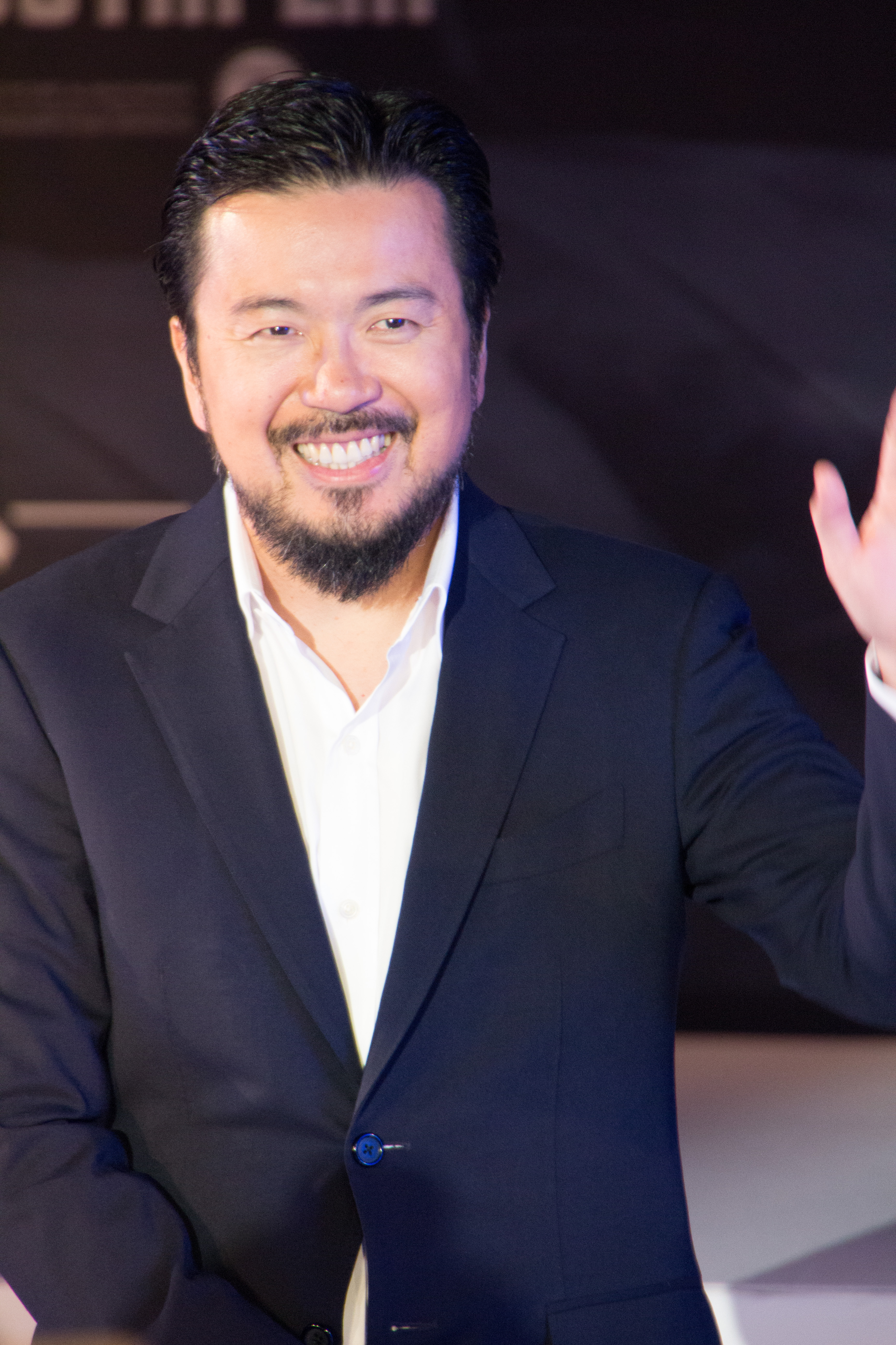 スター・トレック BEYOND ジャパン・プレミア レッドカーペット ジャスティン・リン